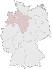 Diese Karte zeigt die Position einer Gemeinde in Deutschland. Der Name der Gemeinde ist unten angegeben Oldenburg